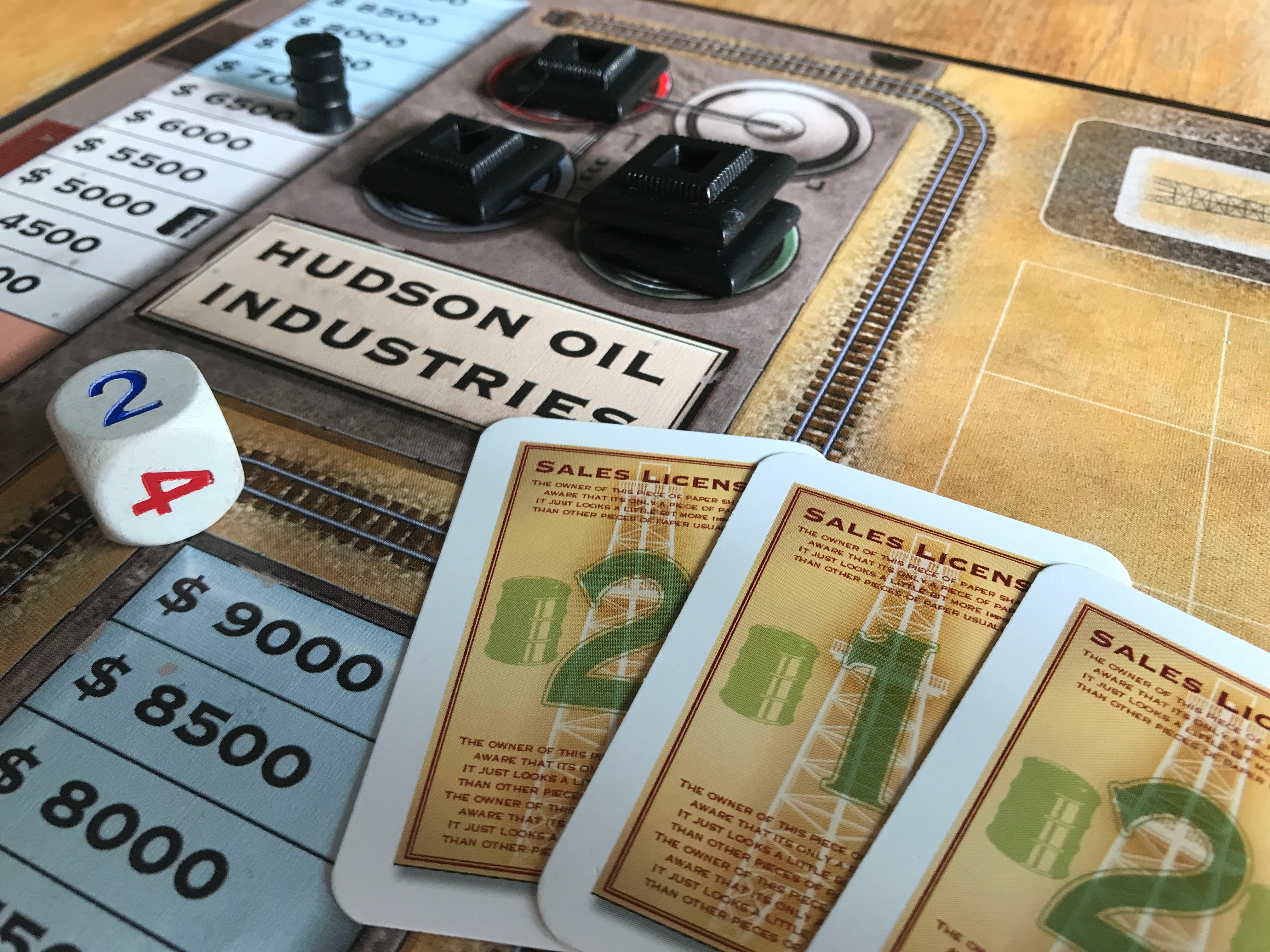 Spielmaterial des Brettspiels Giganten (1999)